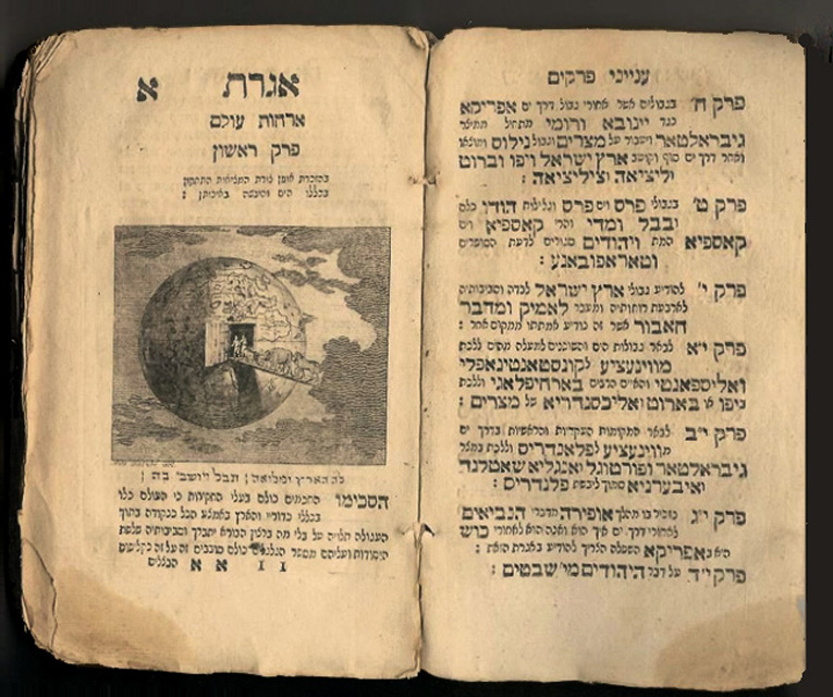 Impression de 1793 de Cosmography & Geography d'Abraham ben Mordecai Farissol